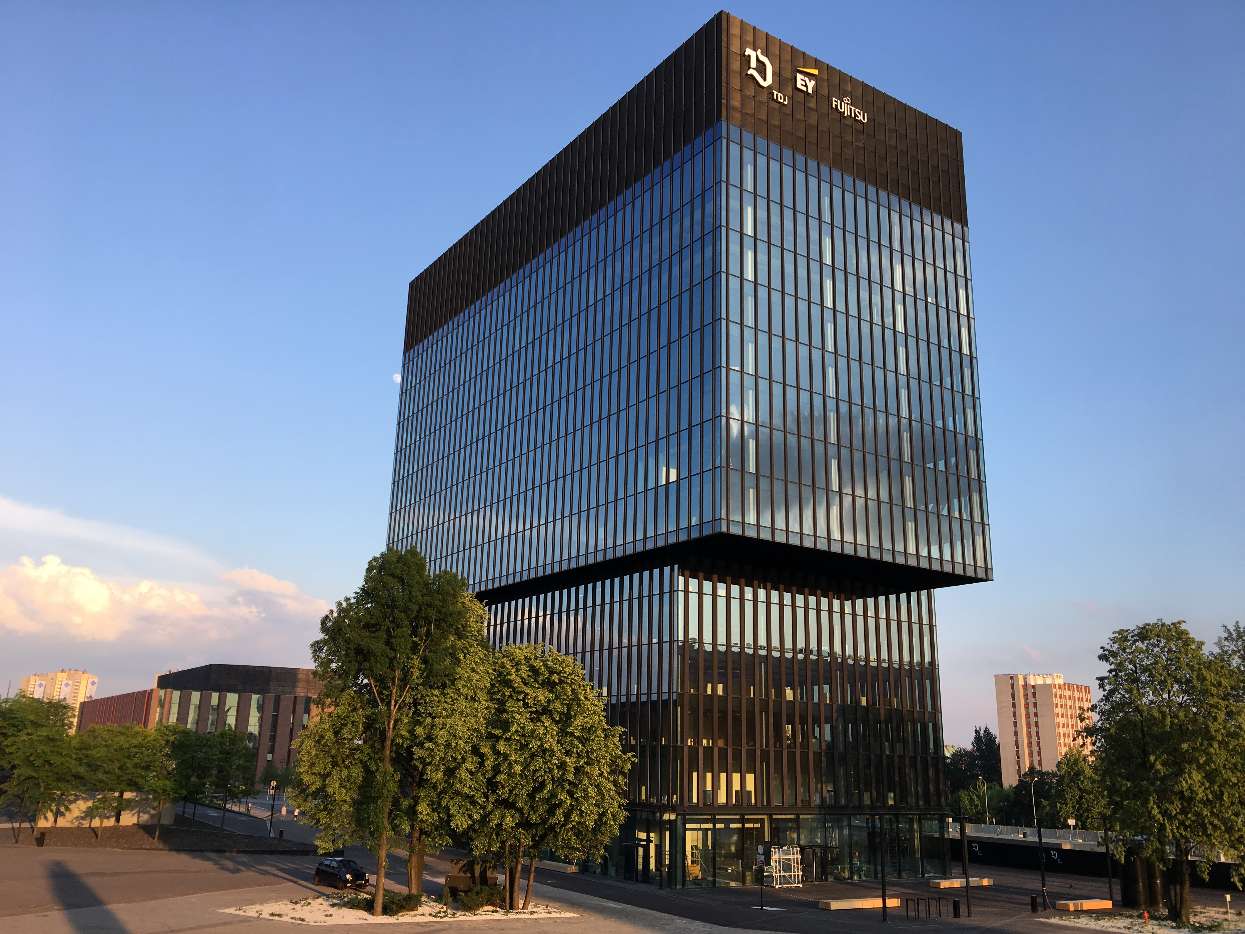 Zdjęcie przedstawia biurowiec .KTW w Katowicach, stan na maj 2018, jeszcze przed otwarciem.